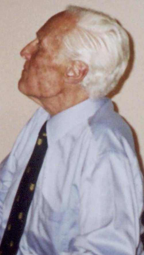 Willem Oltmans op een lezing op de Universiteit van Maastricht, 2004